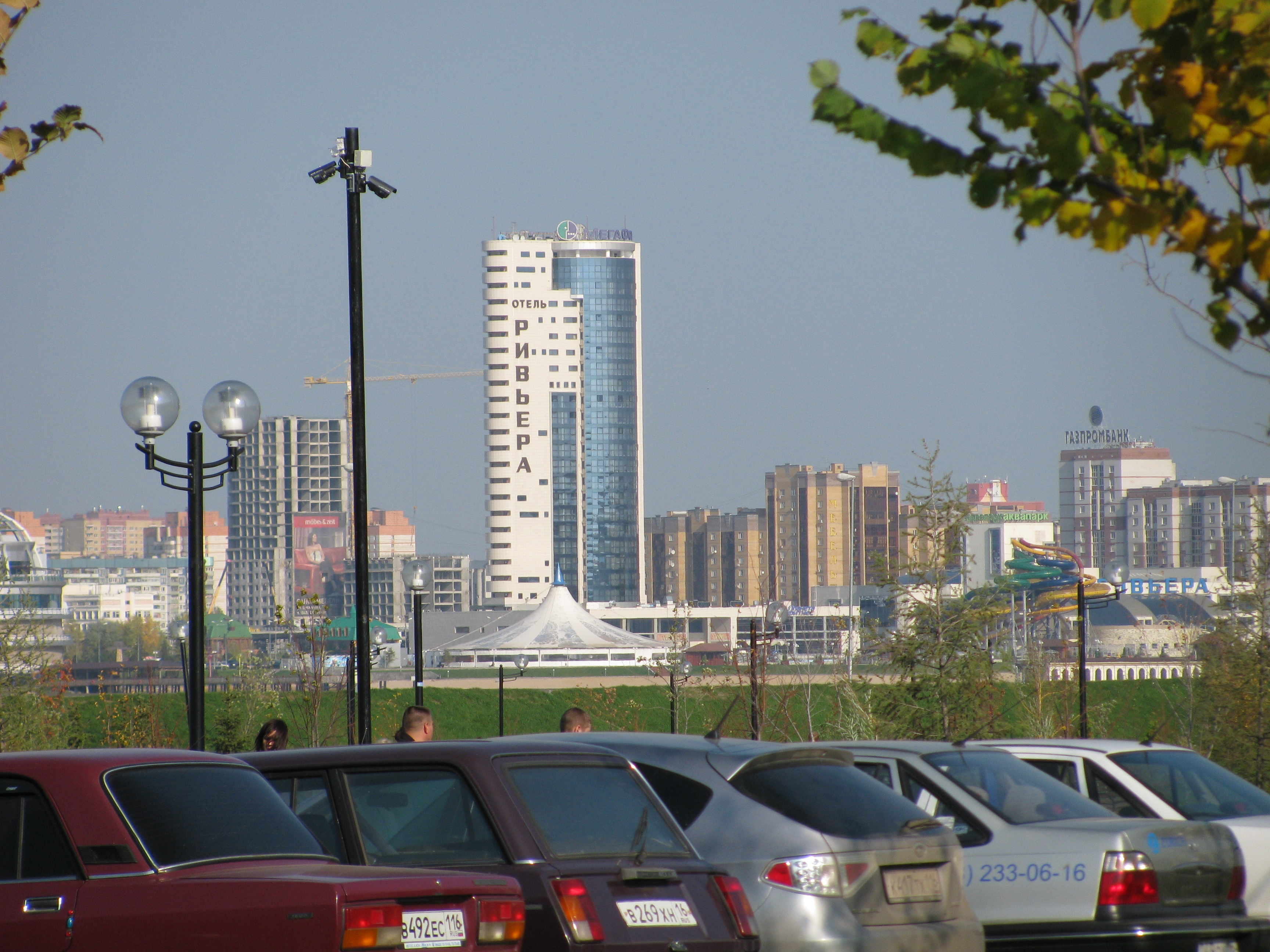 Гостиница Ривьера на проспекте Амирхана - вид с кремлевского холма